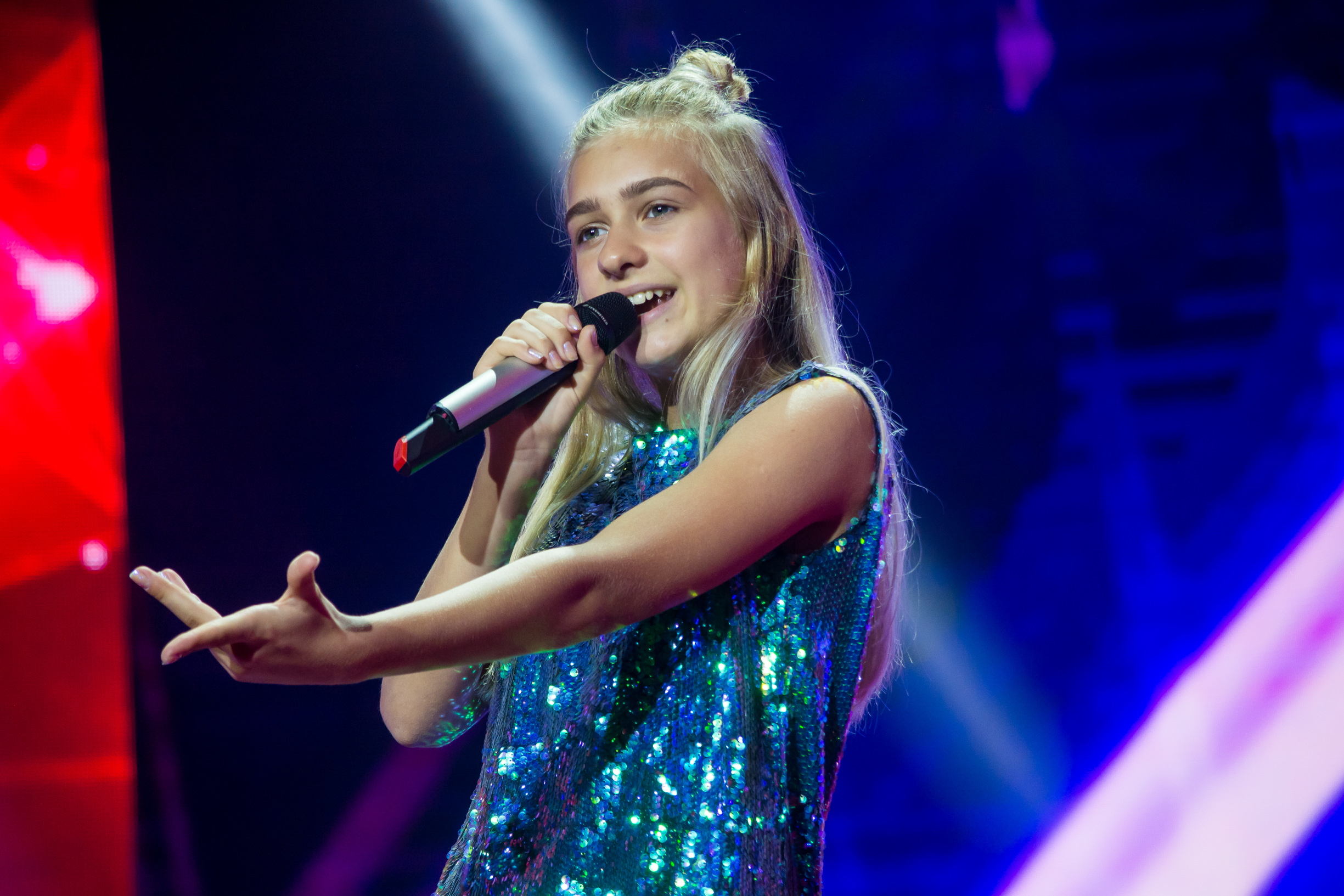 Зинаида Куприянович на белорусском отборе на Детское Евровидение 2016